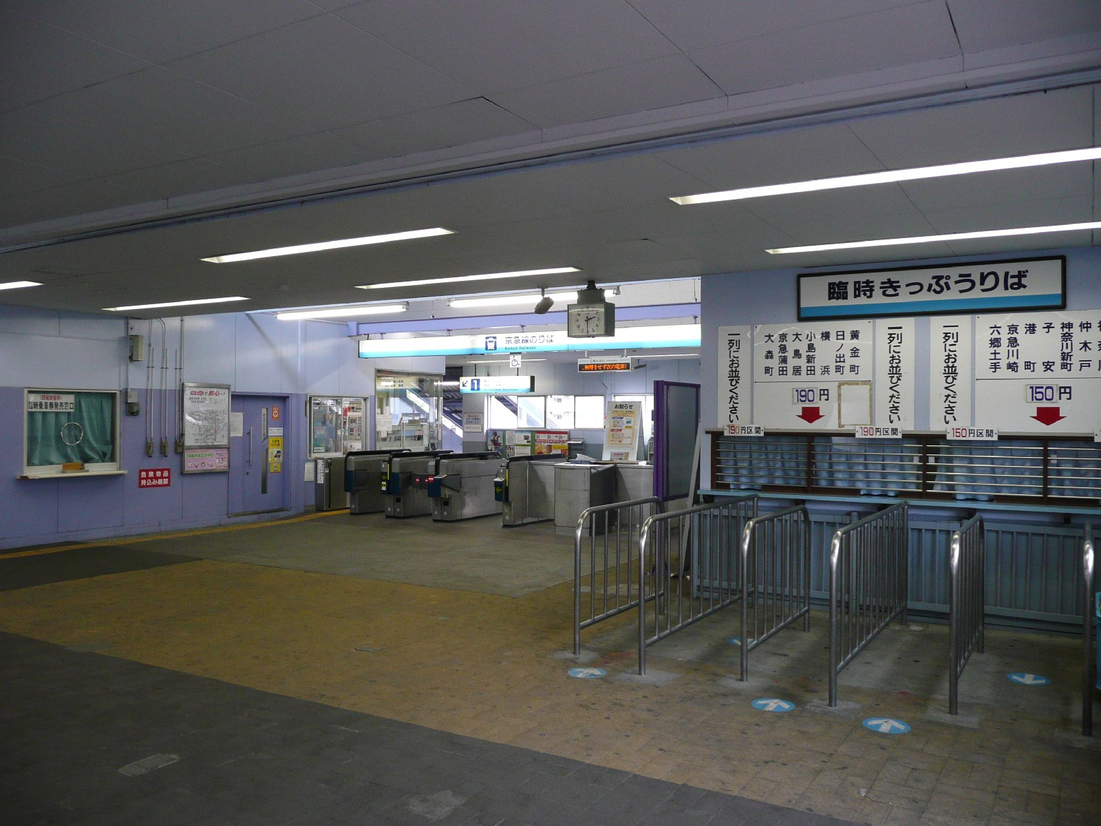 花月園前駅改札口と臨時きっぷうりば